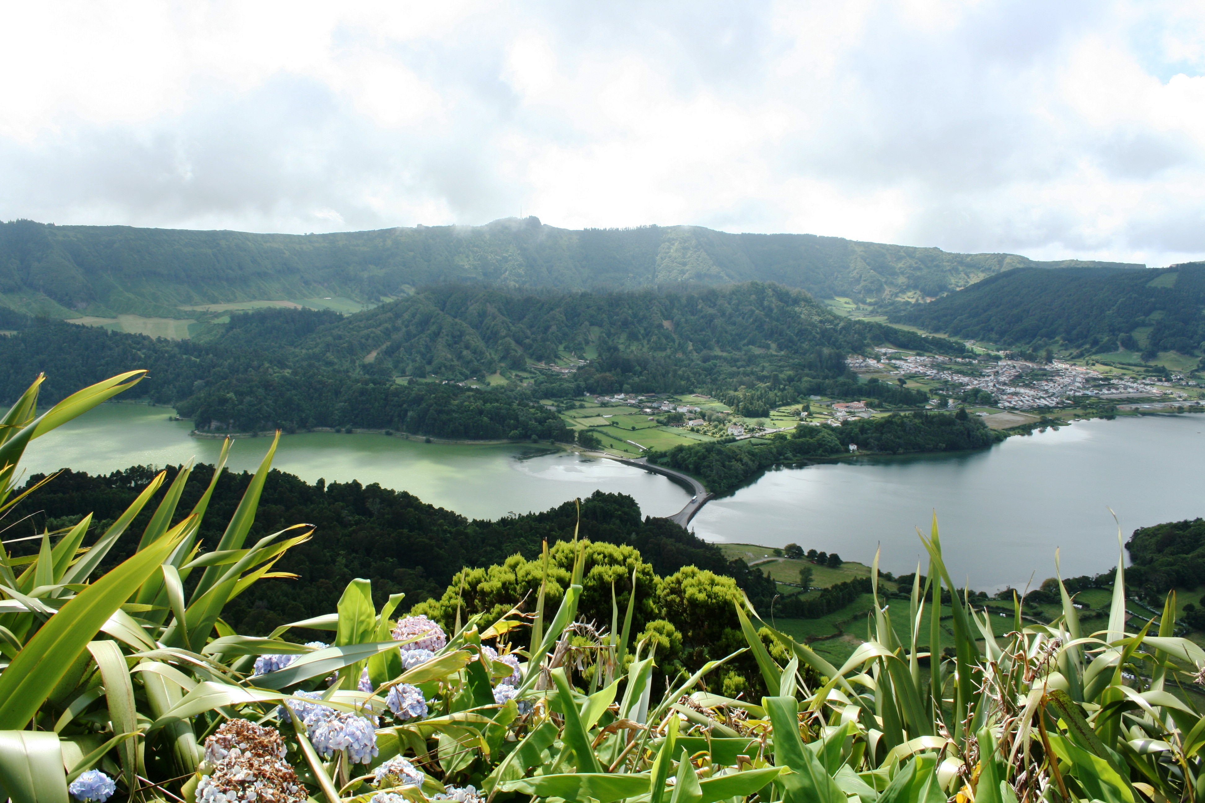 Sao Miguel Azores